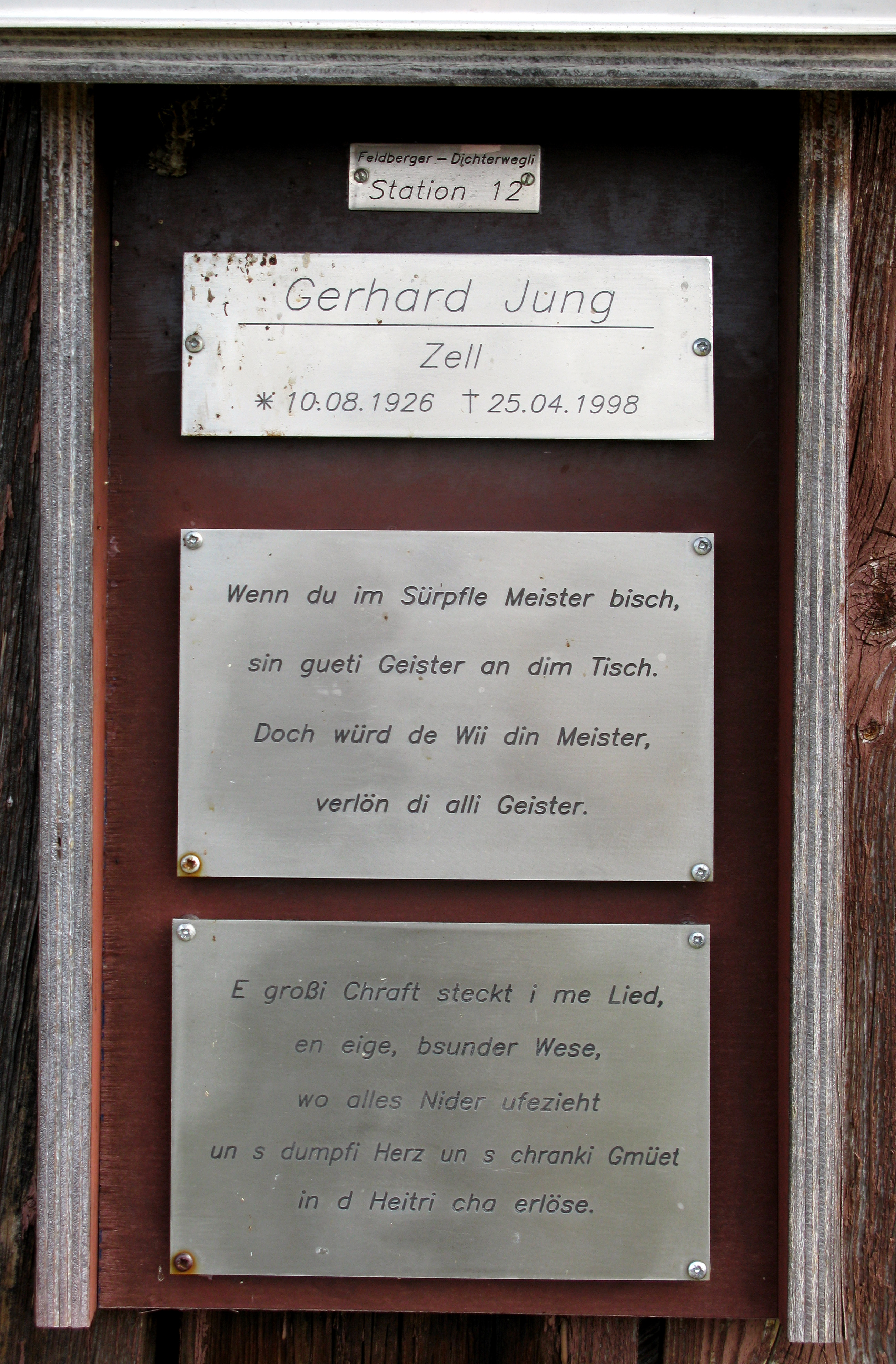 Station 12 des Feldberger Dichterweglis